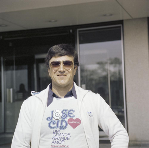 De Portugese zanger José Cid tijdens een fotosessie voor het Eurovisie Songfestival 1980